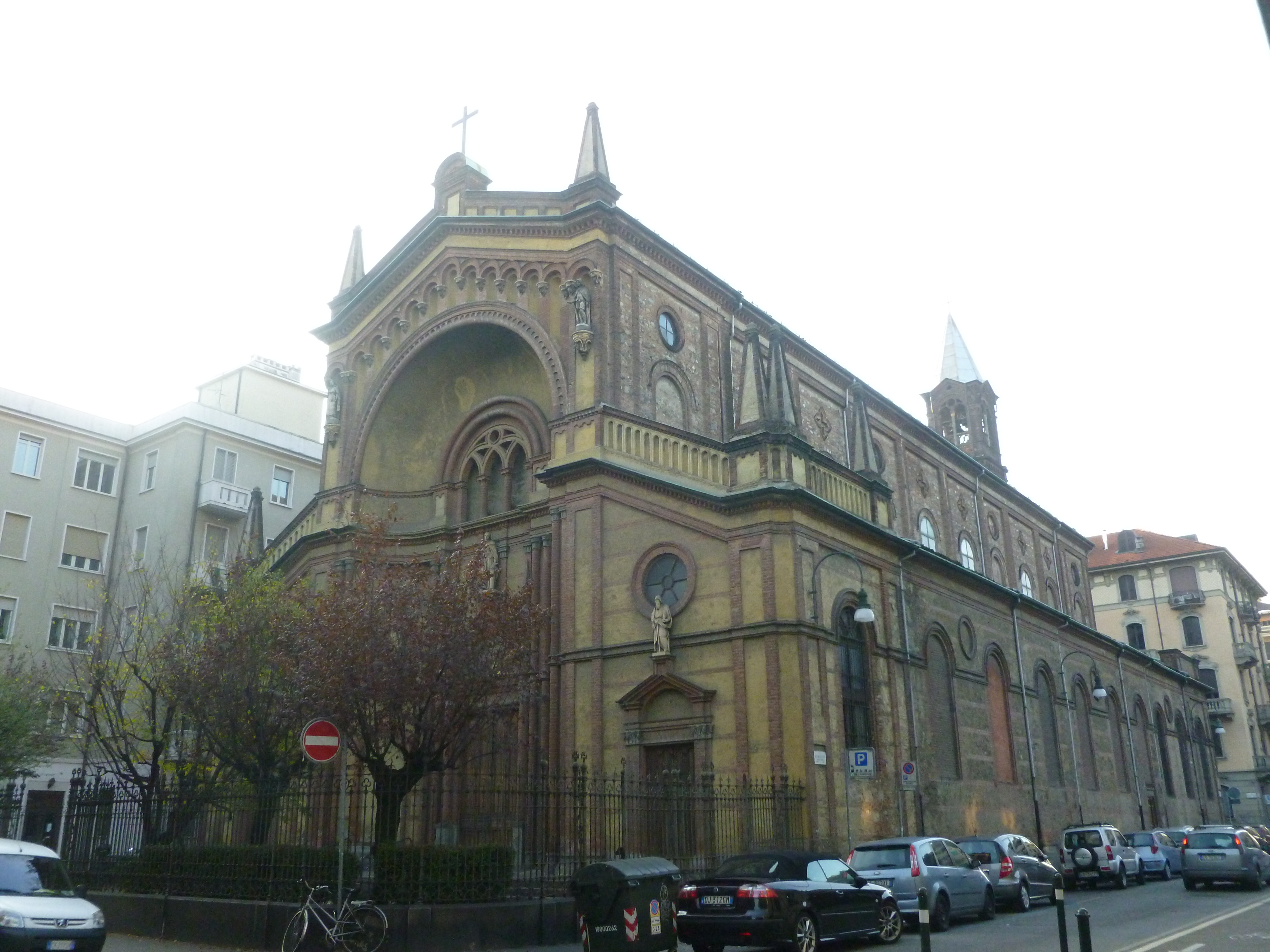 Chiesa di Santa Barbarba, a Torino (1867-1869).